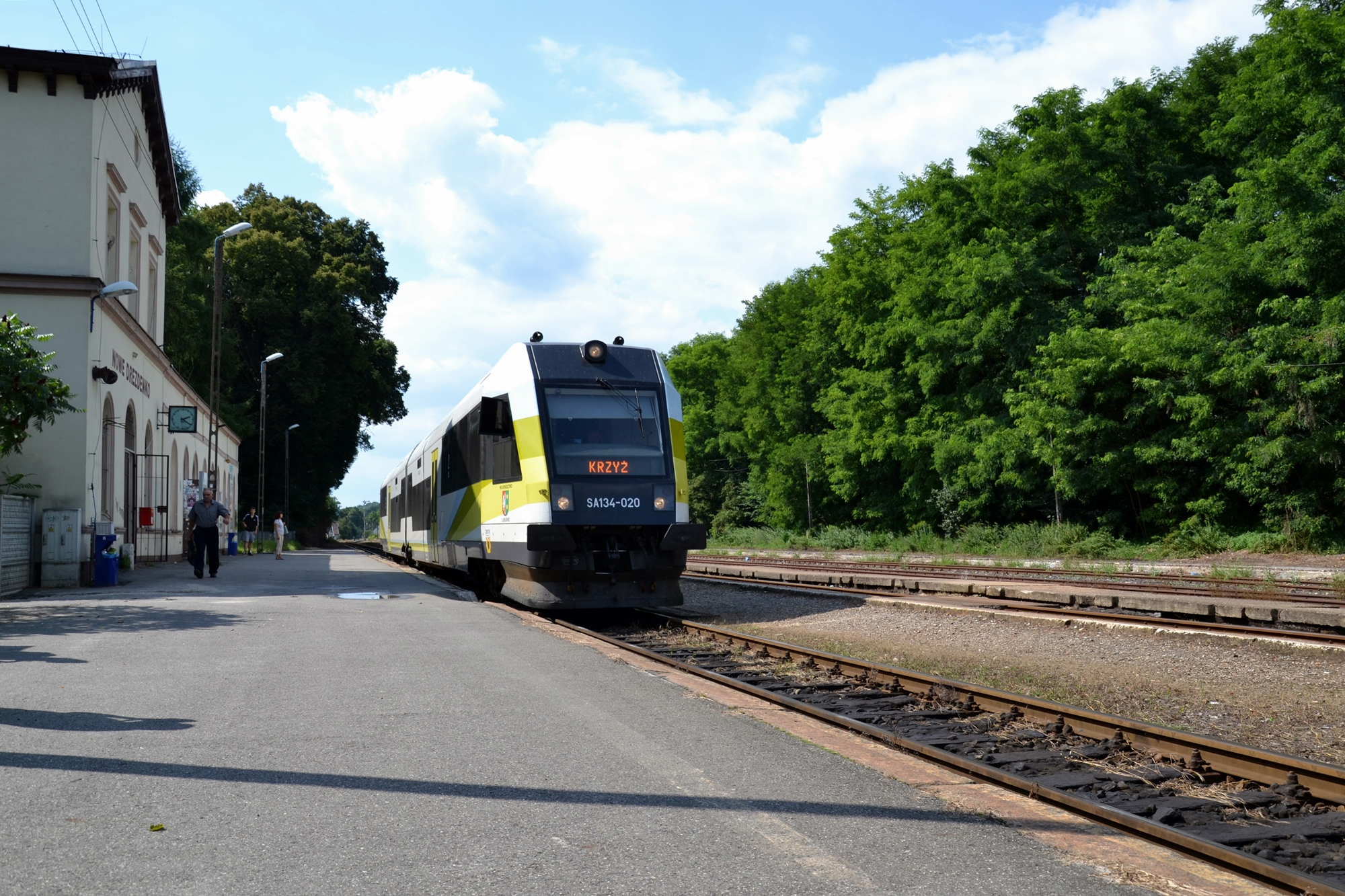 SA134-020 na stacji w Nowym Drezdenku